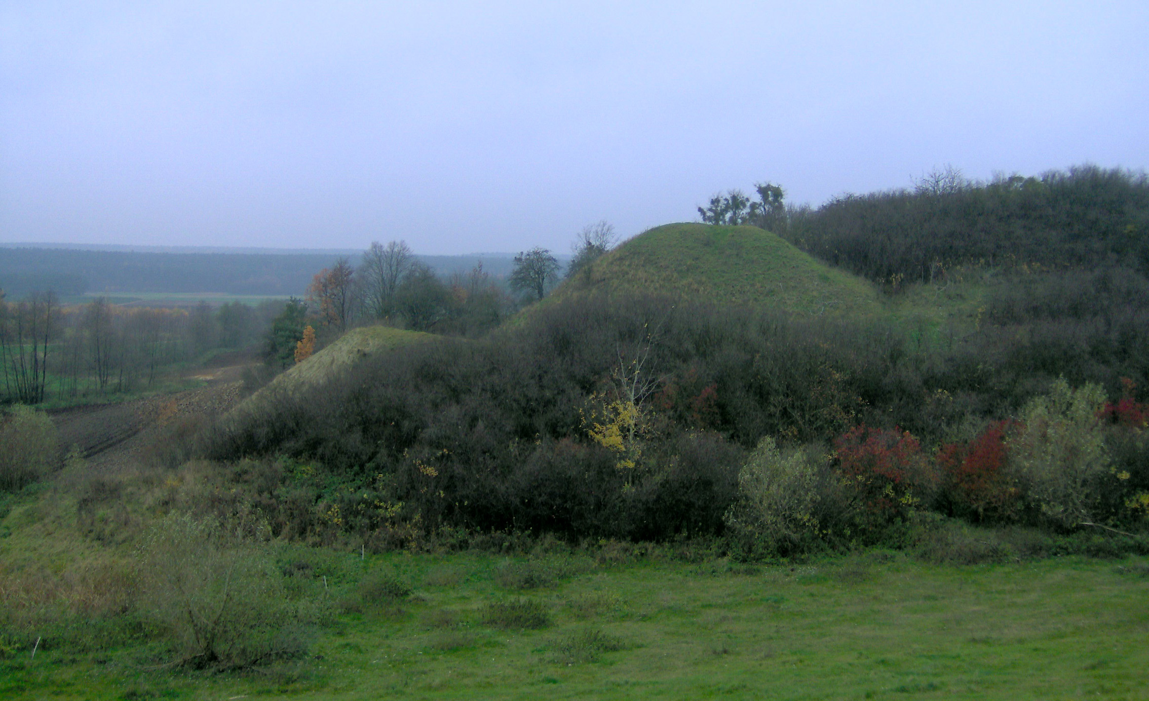 Medieval gord in Płonko